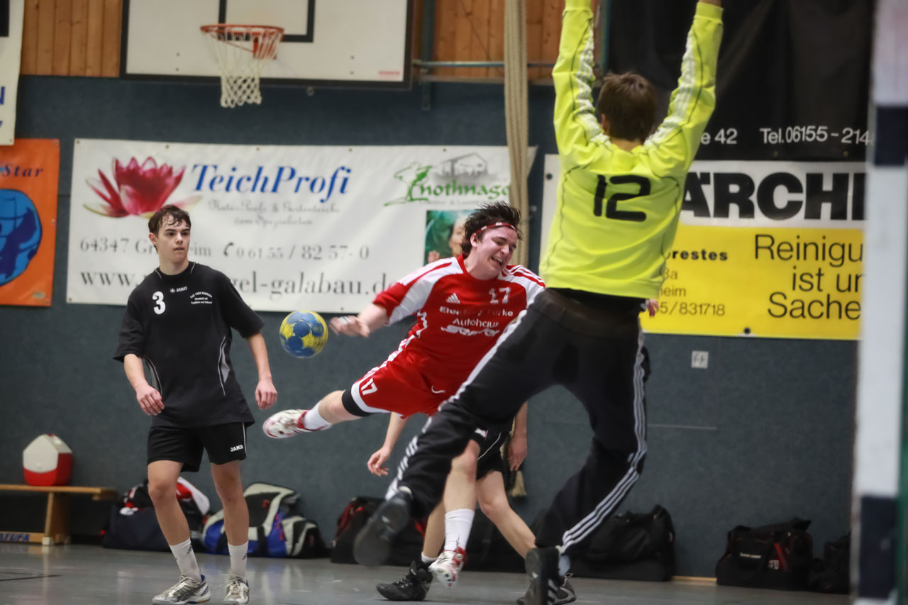 Ein "Dreher" — eine spezielle Wurftechnik beim Handball. Ausgeführt von Marvin Gernandt von der TuS Griesheim am 27. März 2011 im Regionalligaspiel der männlichen A-Jugend gegen die TuS Holzheim in der Griesheimer Sporthalle der Gerhart-Hauptmann-Schule. Im Tor Benedikt Müller. Dieses Bild ist beim Autor in einer wesentlich höheren Auflösung verfügbar.